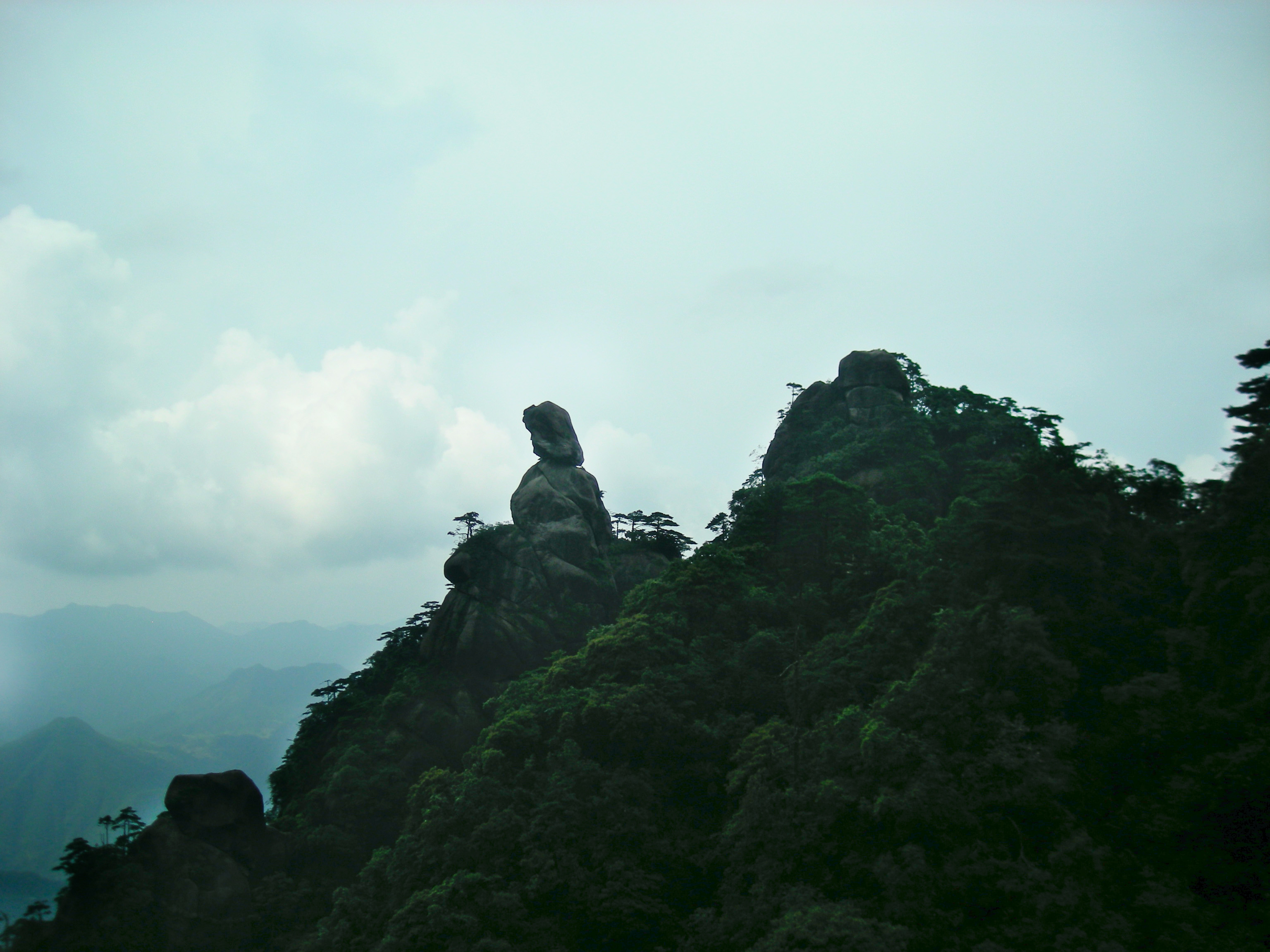 三清山司春女神